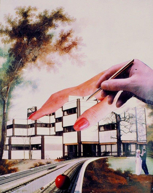 Свадебная архитектура (Краснай шар), 1985